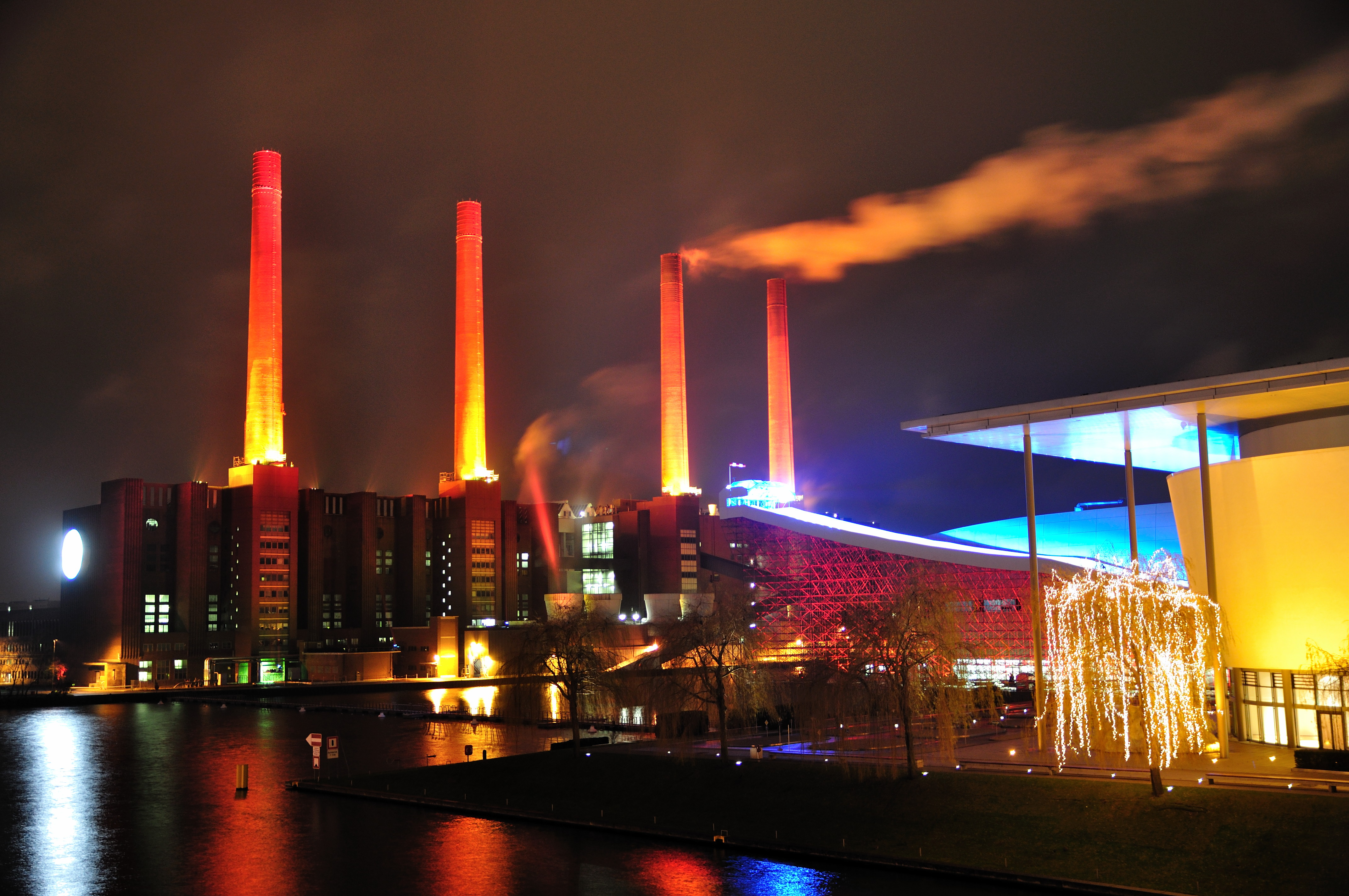 altes Kraftwerk bei Nacht am Mittellandkanal im Volkswagenwerk Wolfsburg. This is a photograph of an architectural monument.It is on the list of cultural monuments of Wolfsburg